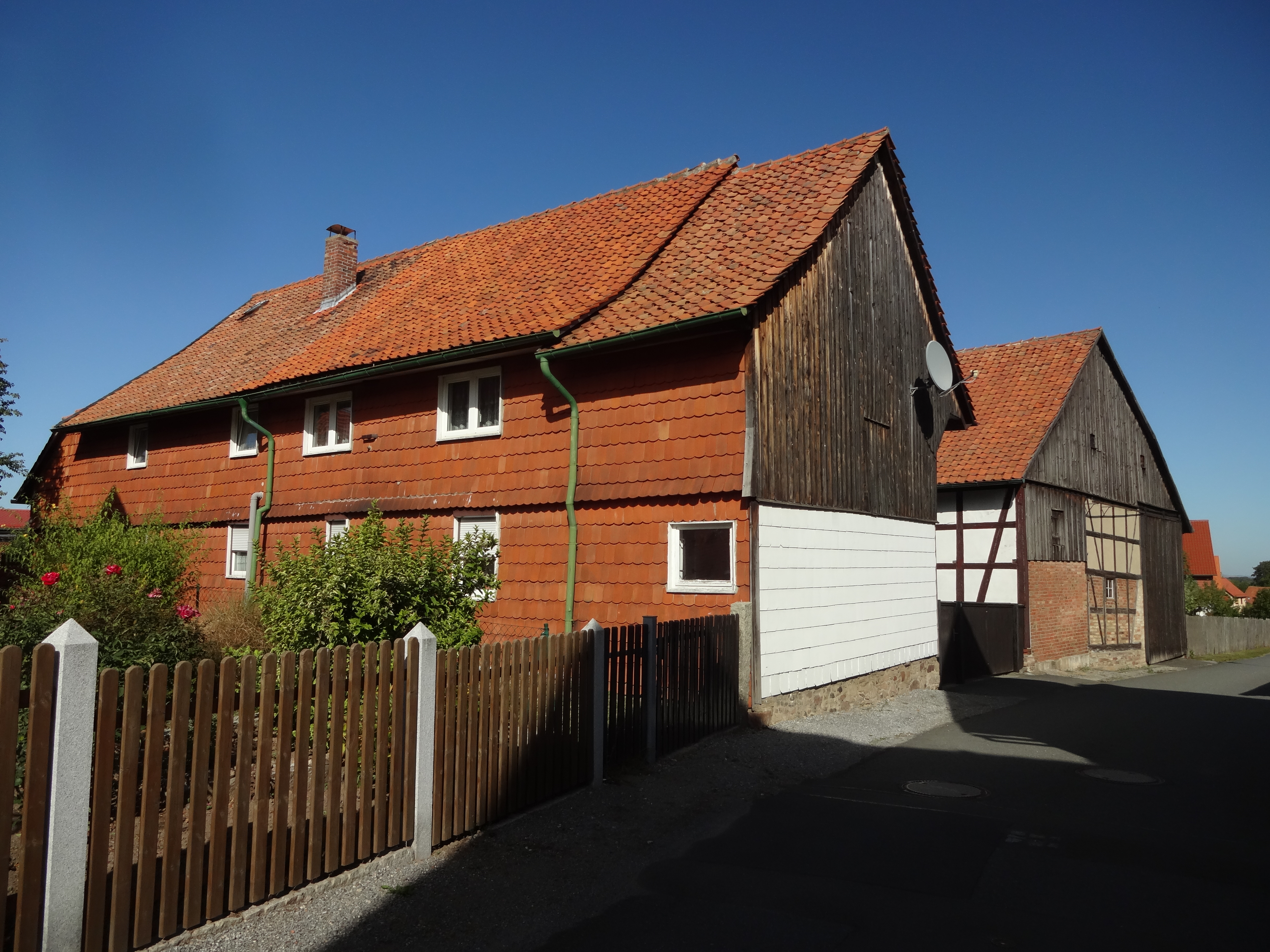 denkmalgeschützter Bauernhof in der Schmiedestraße 18 in Drübeck